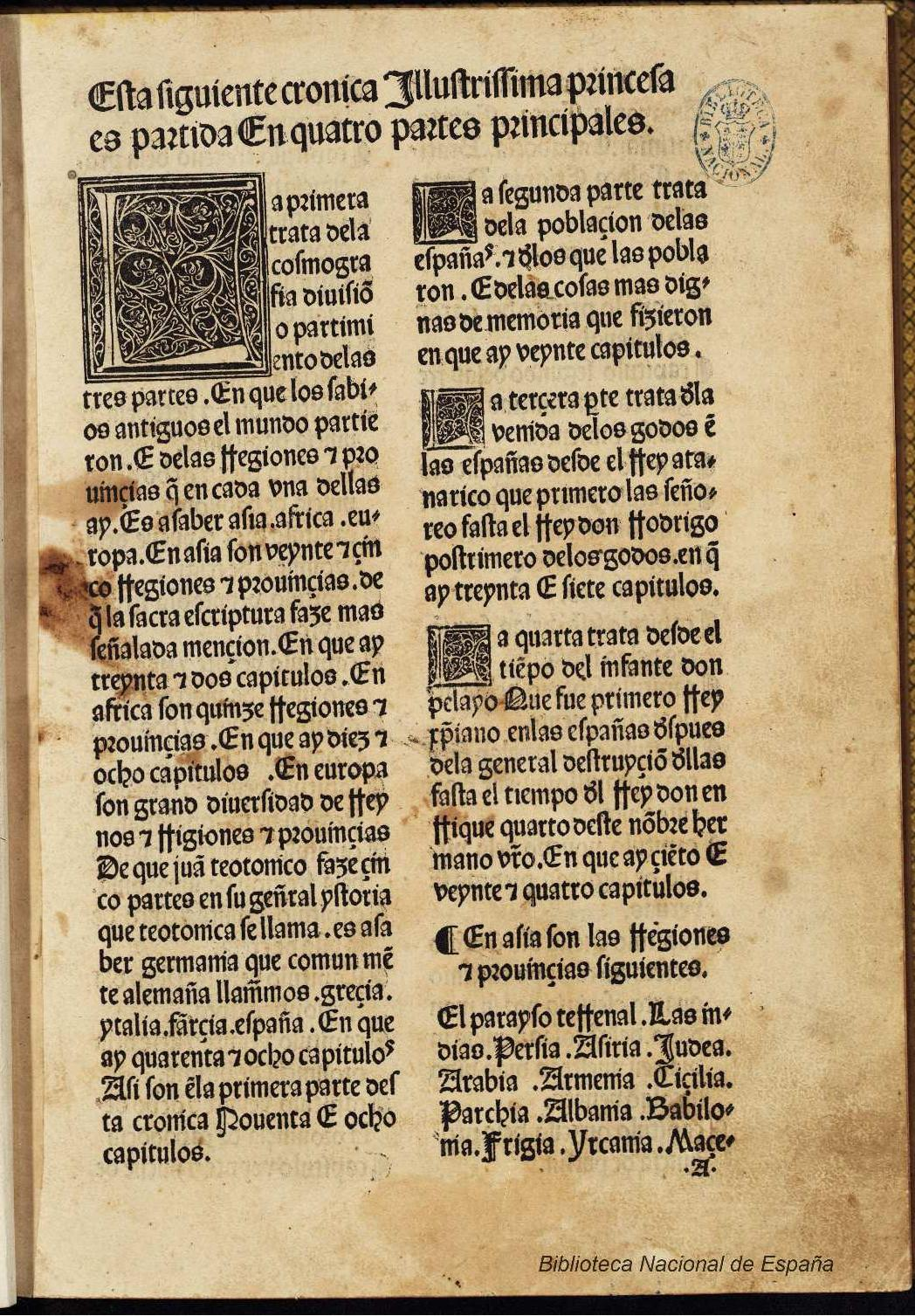 Crónica de España Autor: Valera, Diego de (1412-ca. 1488) Fecha: 1487 Datos de edición: E[n] vuestra muy noble [et] muy leal cibdad de burgos, fue impresa por el dicho frederico (Biel de Basilea, Fadrique)